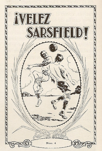 Cover of the official Club Atlético Vélez Sarsfield magazine.